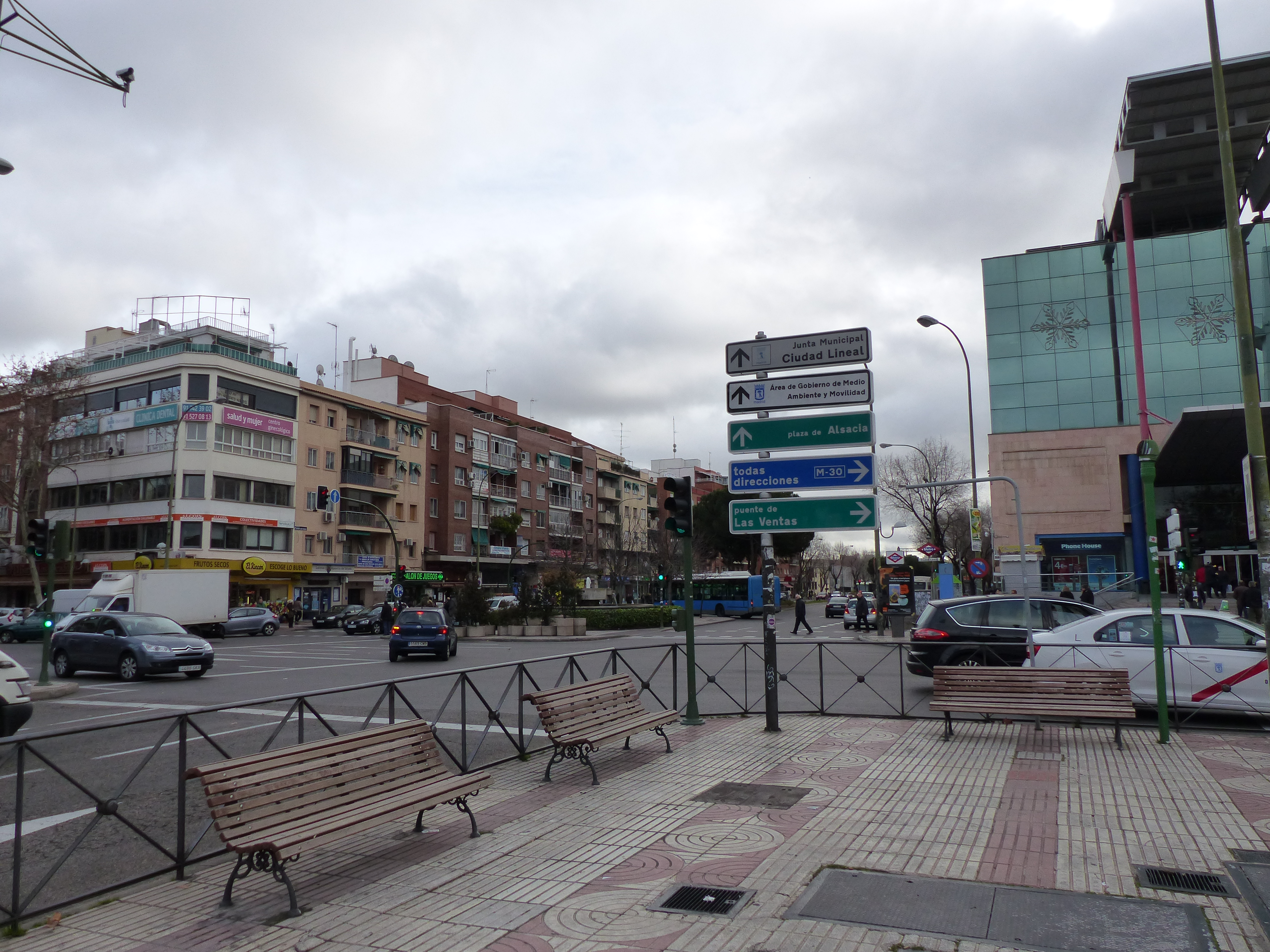 Pueblo Nuevo, centro comercial